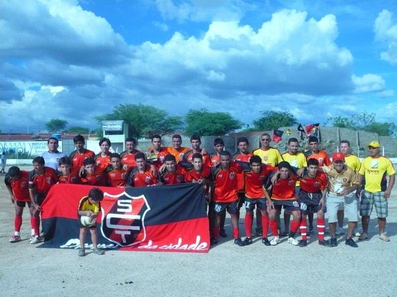 Equipe campeã tabirense em 2009.